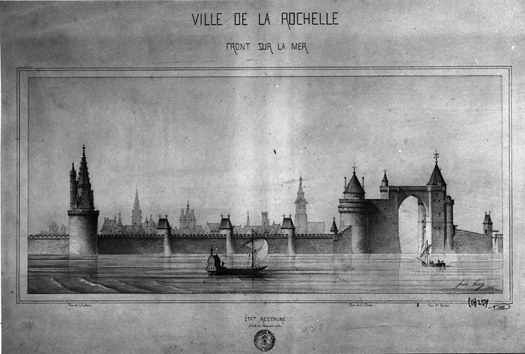 Illustration réalisée par Juste Lisch en 1864 et qui représente, selon lui, les tours du Vieux-Port de La Rochelle avant qu'elles n'aient été endommagées.